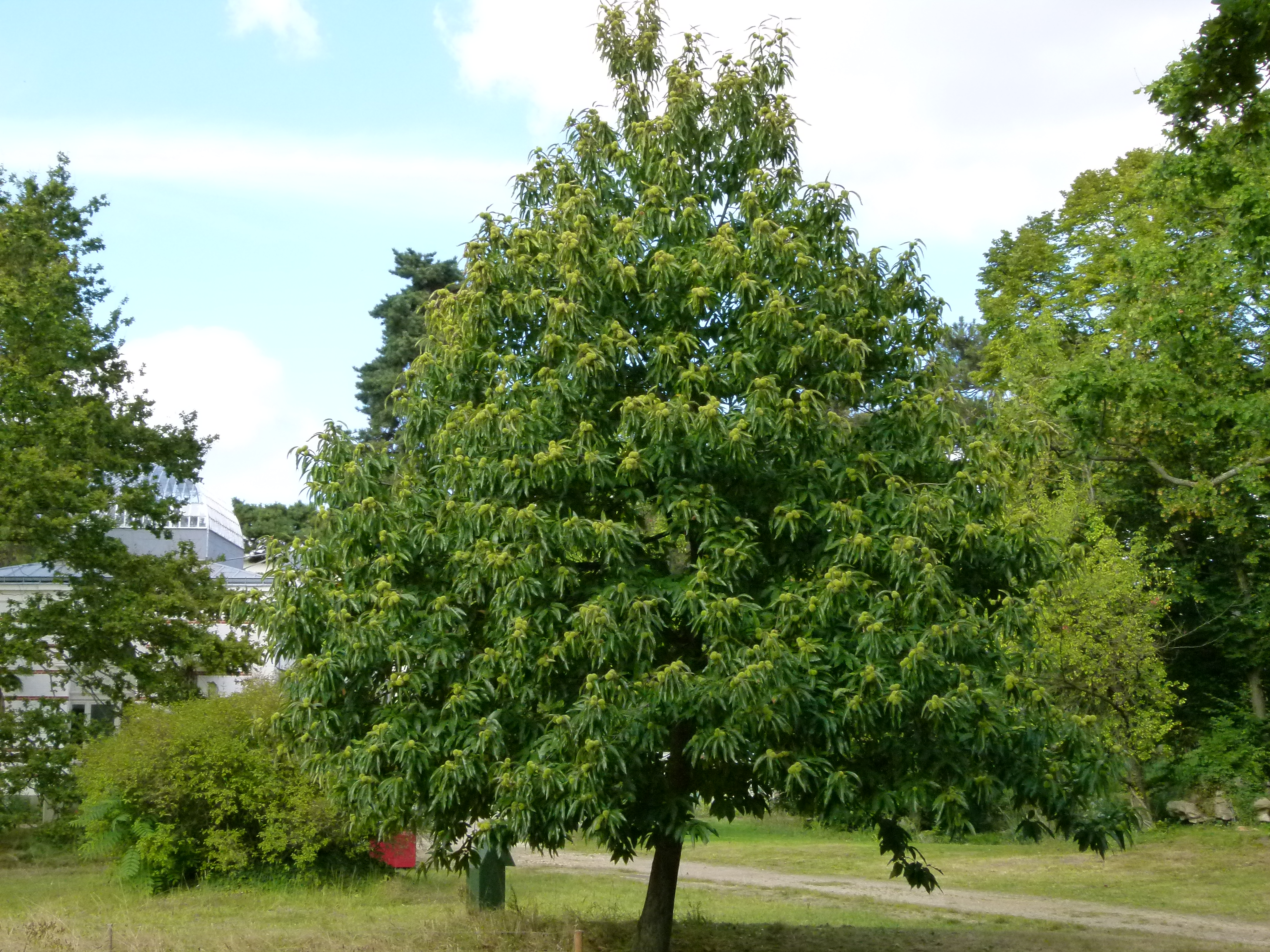 Chataignier